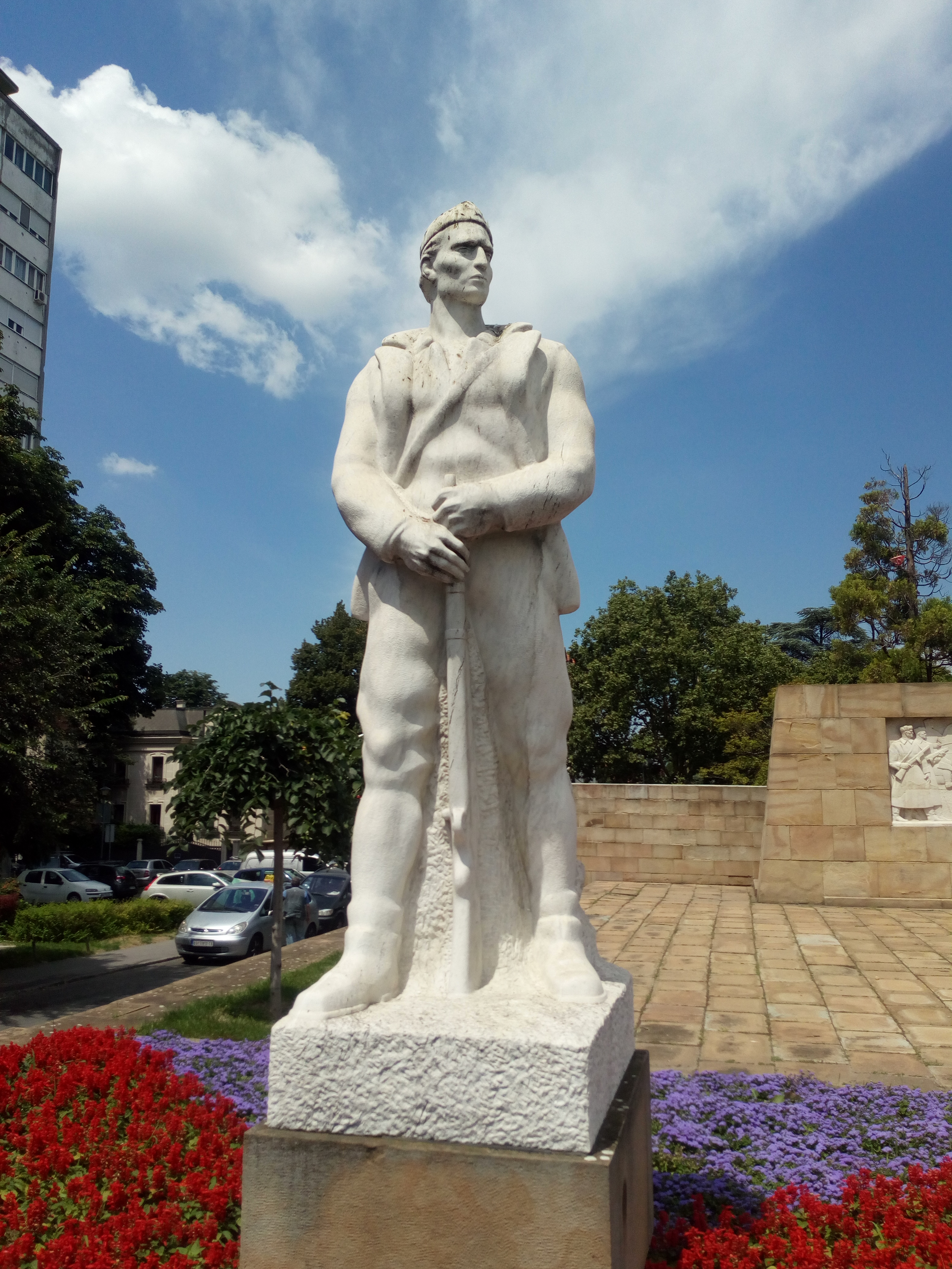 Spomenik Partizan na večnoj straži, na Groblju oslobodilaca Beograda 1944.